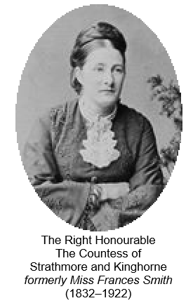 The Right Honourable The Countess of Strathmore and Kinghorne, formerly Miss Frances Smith